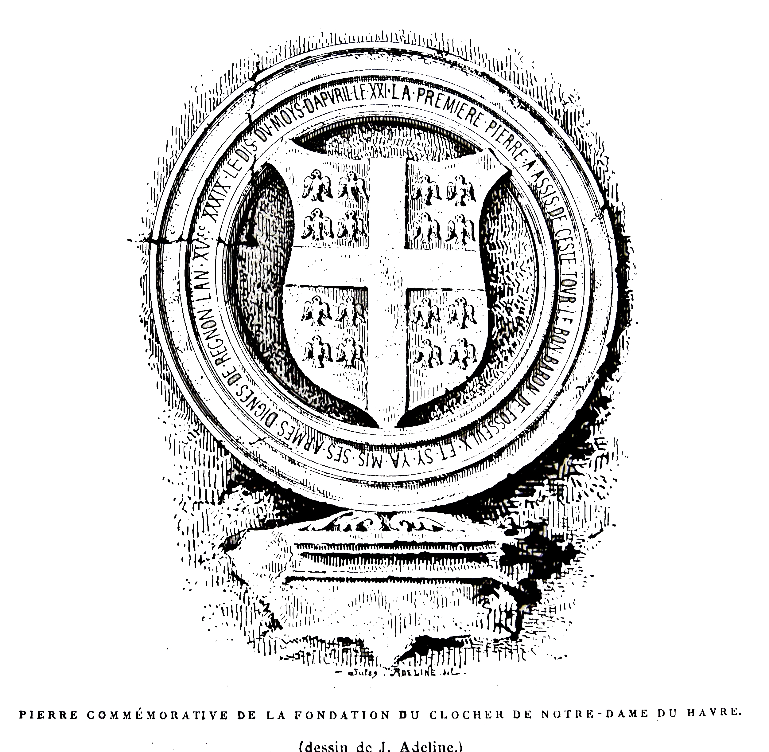 Première pierre de la tour de la cathédrale : blason du baron et phrase le désignant (œuvre détruite en 1944).